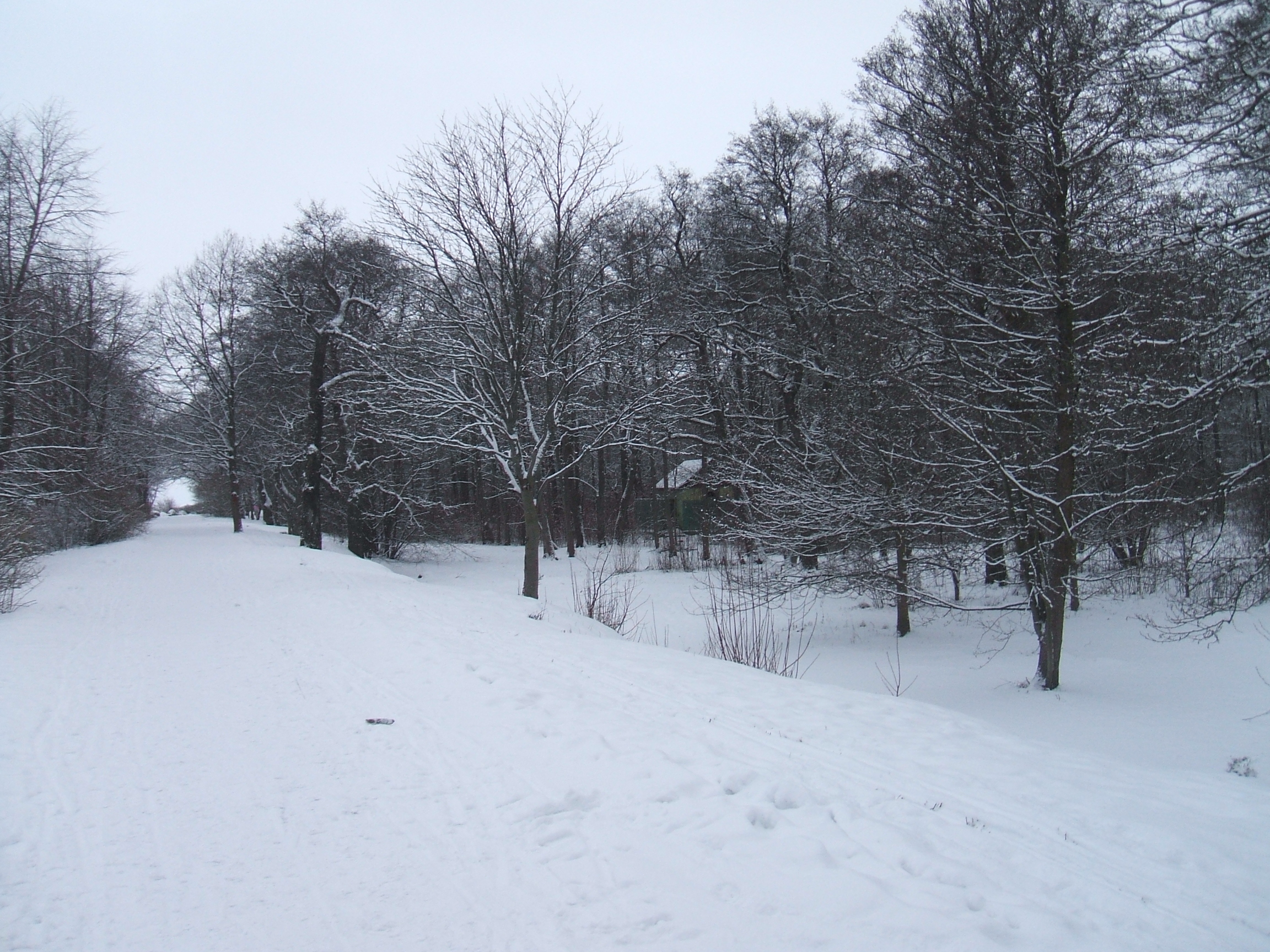 Сестрорецкие Дубки. Место где был дворец Петра I